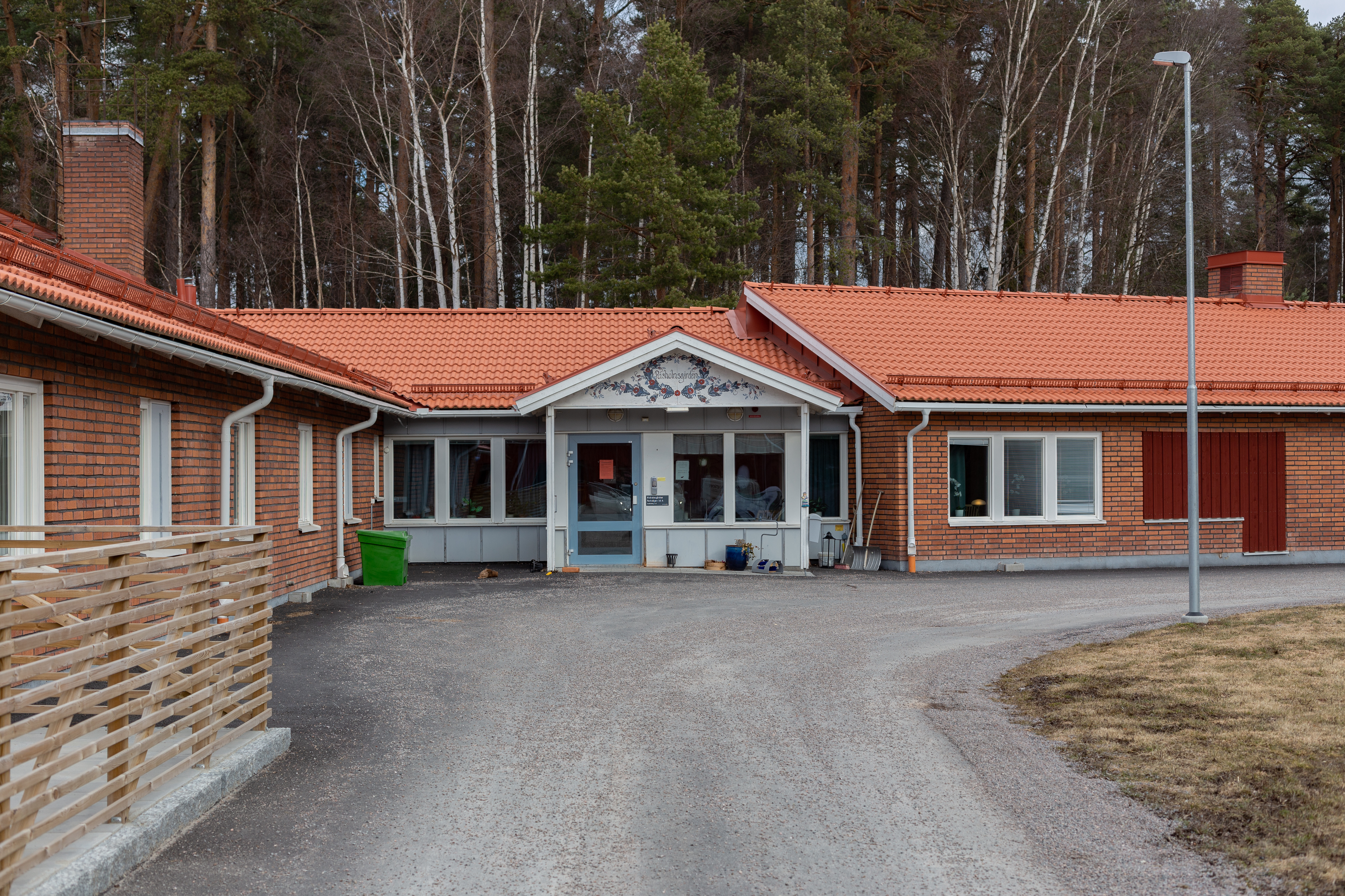 Risholnsgården, Danholn, Falu kommun, Dalarnas län, Sverige